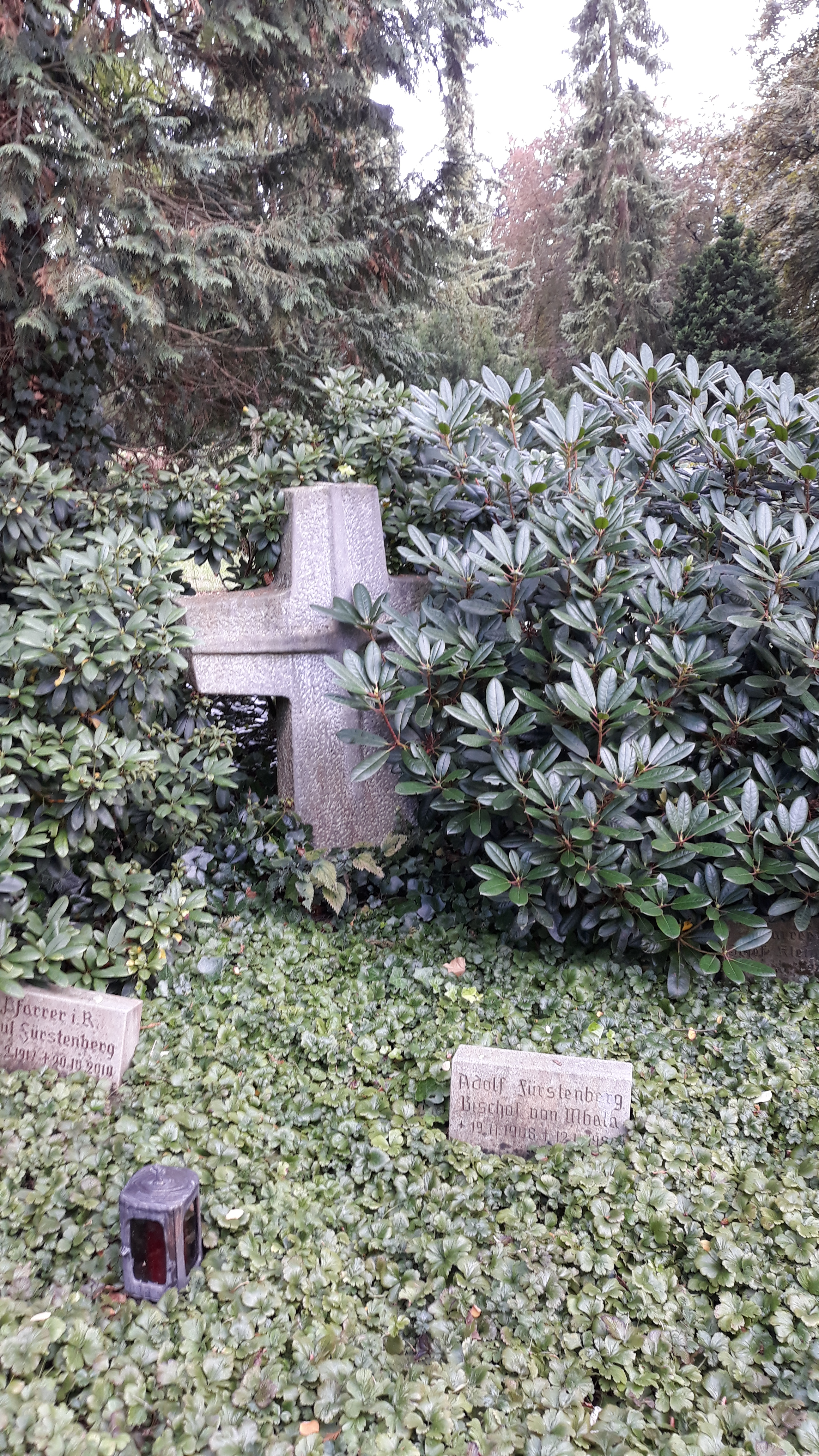 Das Grab des deutschen Bischofs Adolf Fürstenberg auf dem Hauptriedhof Iserlohn.